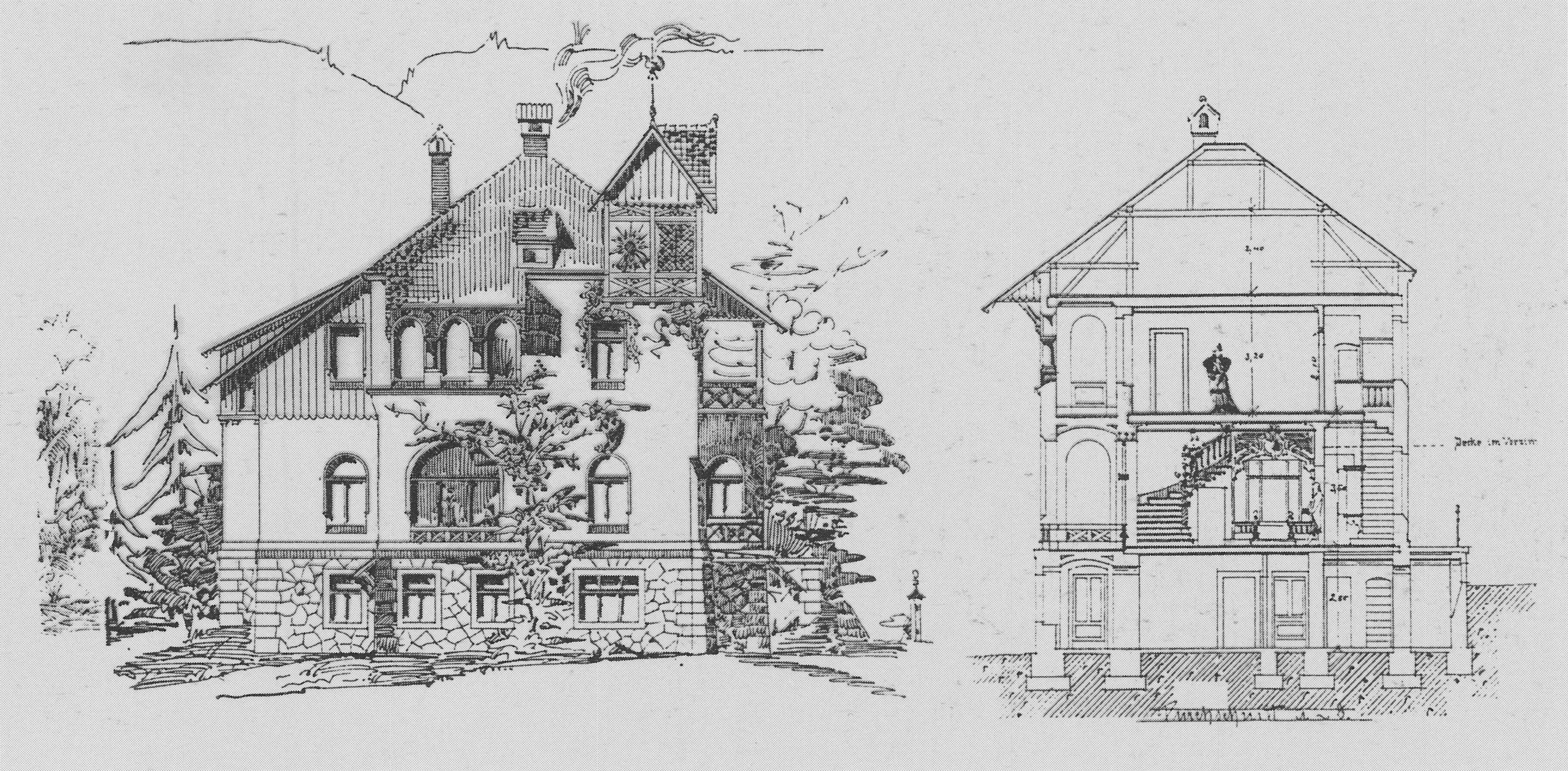 Radebeul Villa Oswald Haenel Entwurf